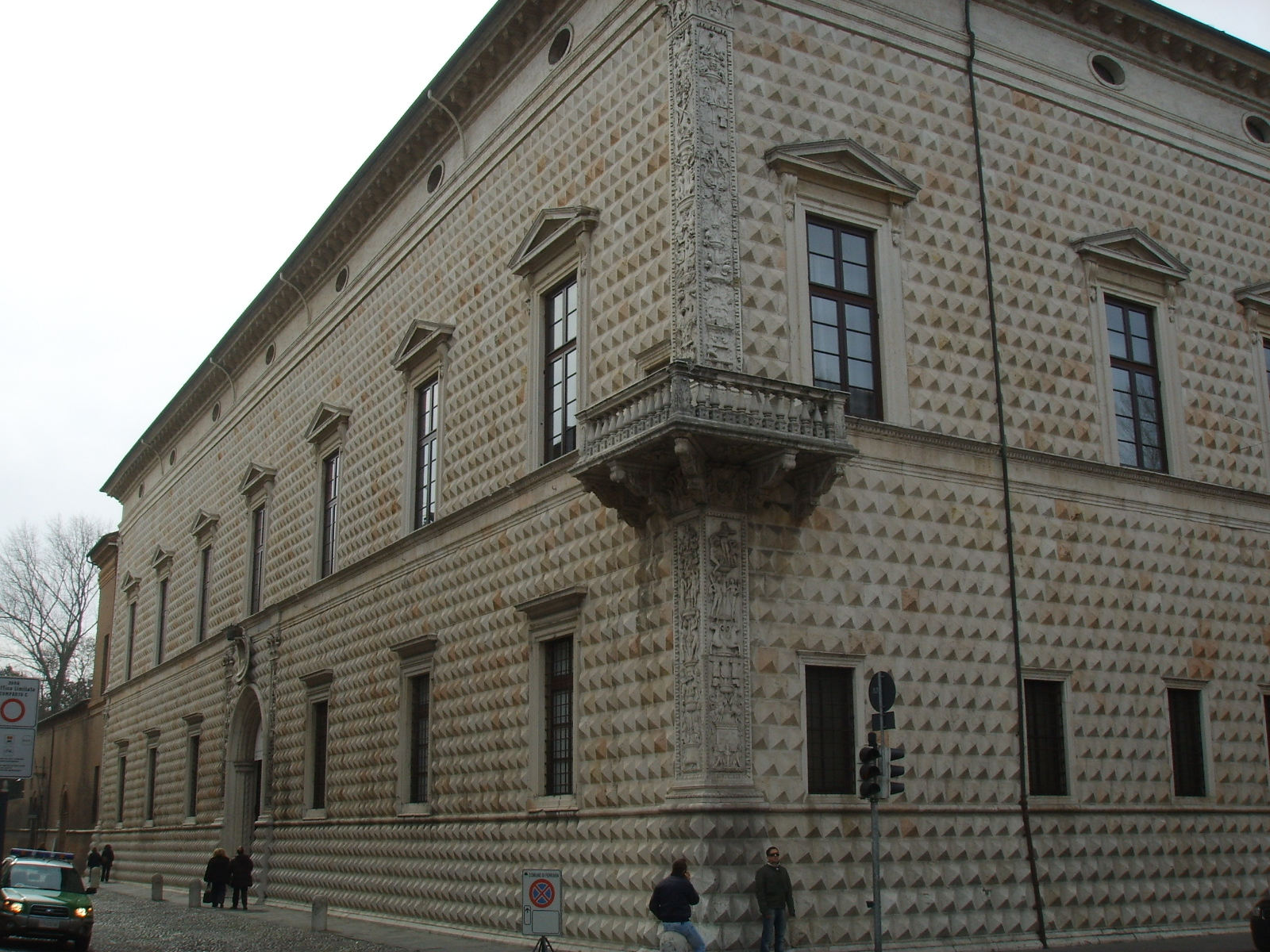 Ferrara, palazzo dei diamanti